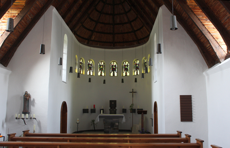 Im Innern der Marienkapelle Heinrichsdorf (Olsberg)